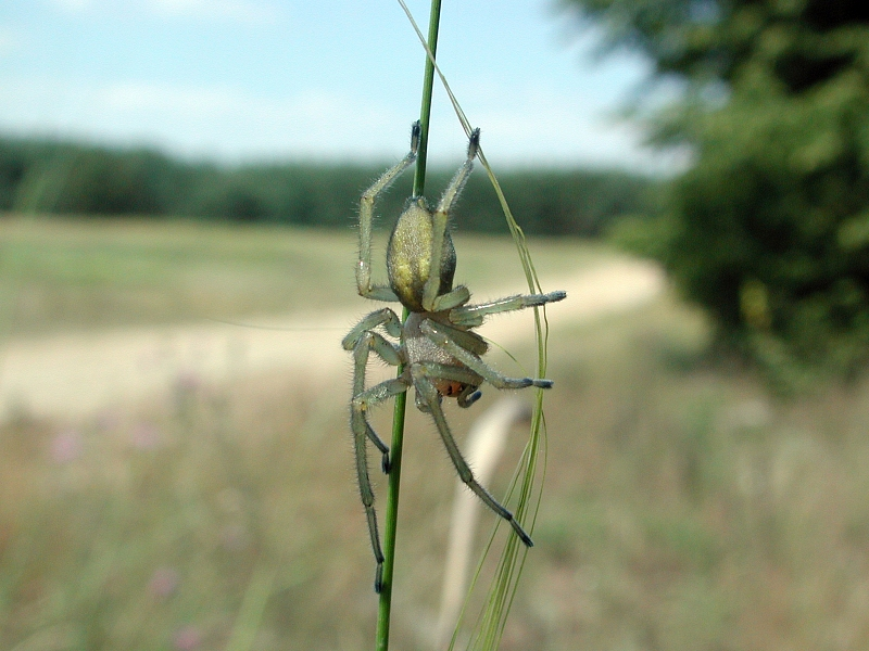 Dornfinger, Cheiracanthium punctorium, Darmstadt, Deutschland (Germany)